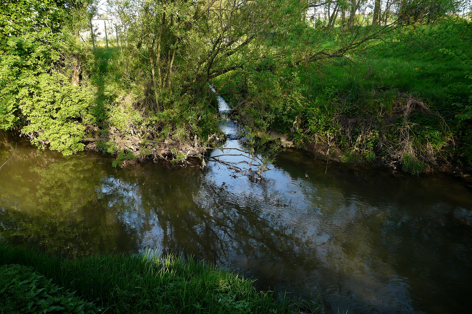 Soutok Veselky (úzký tok nahoře) s náhonem Jizery